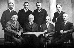 Подєбради: Фото